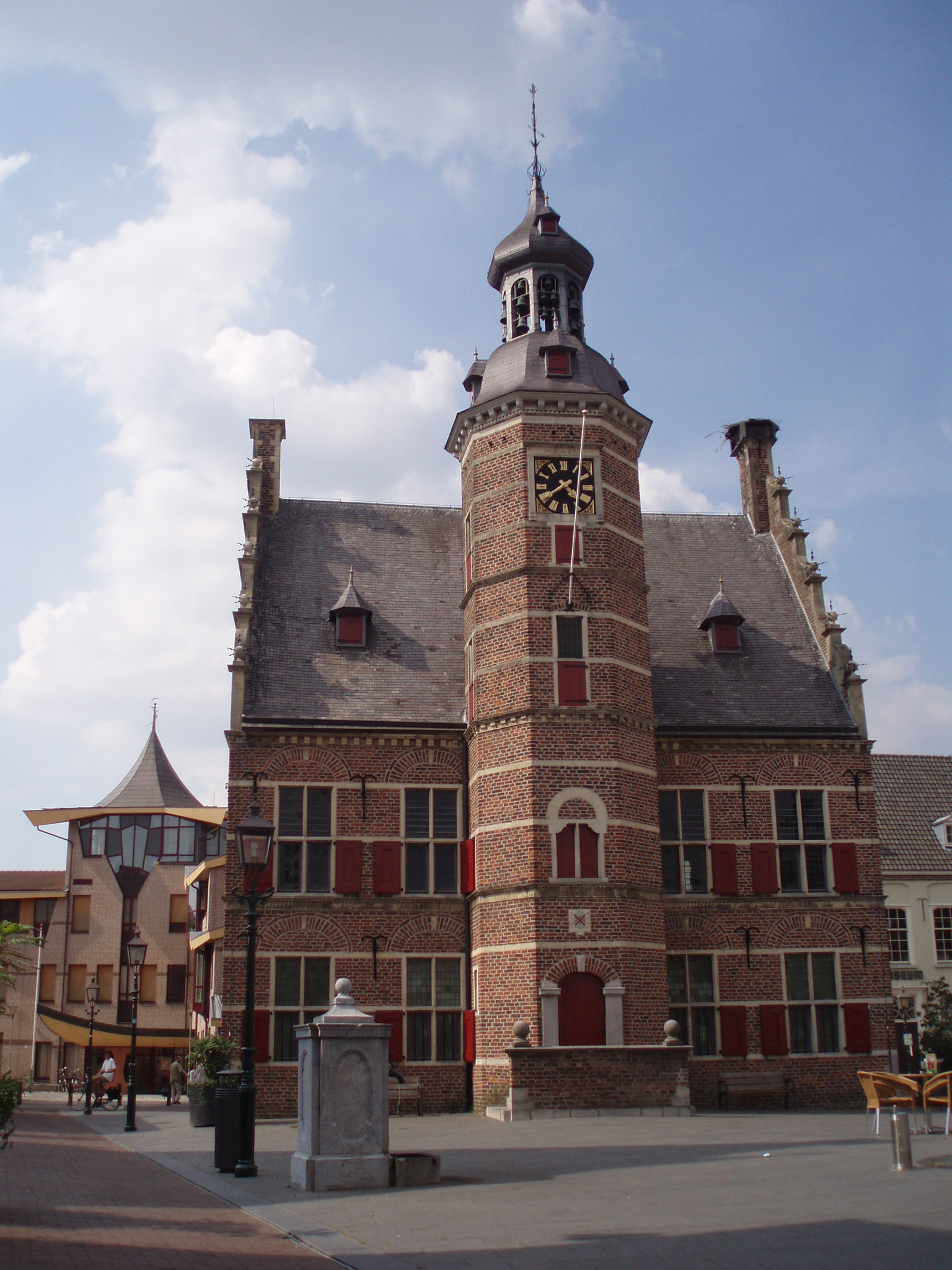 eigen foto 2006 (c) looi